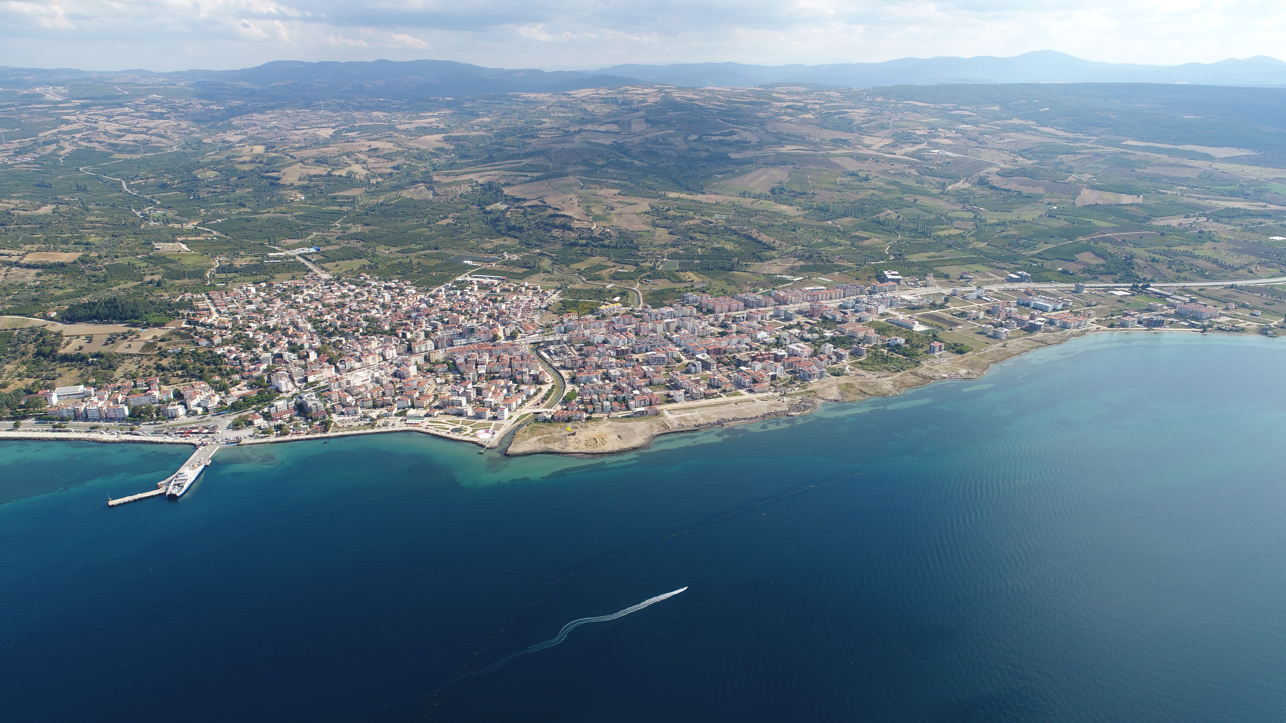 Lapseki Havadan Görüntüsü